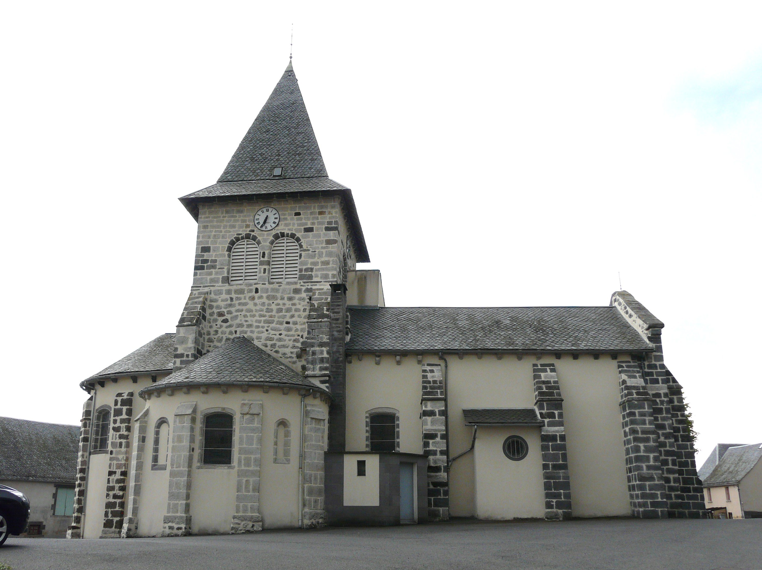 L'église Saint-Georges de Gelles, Puy-de-Dôme, France.